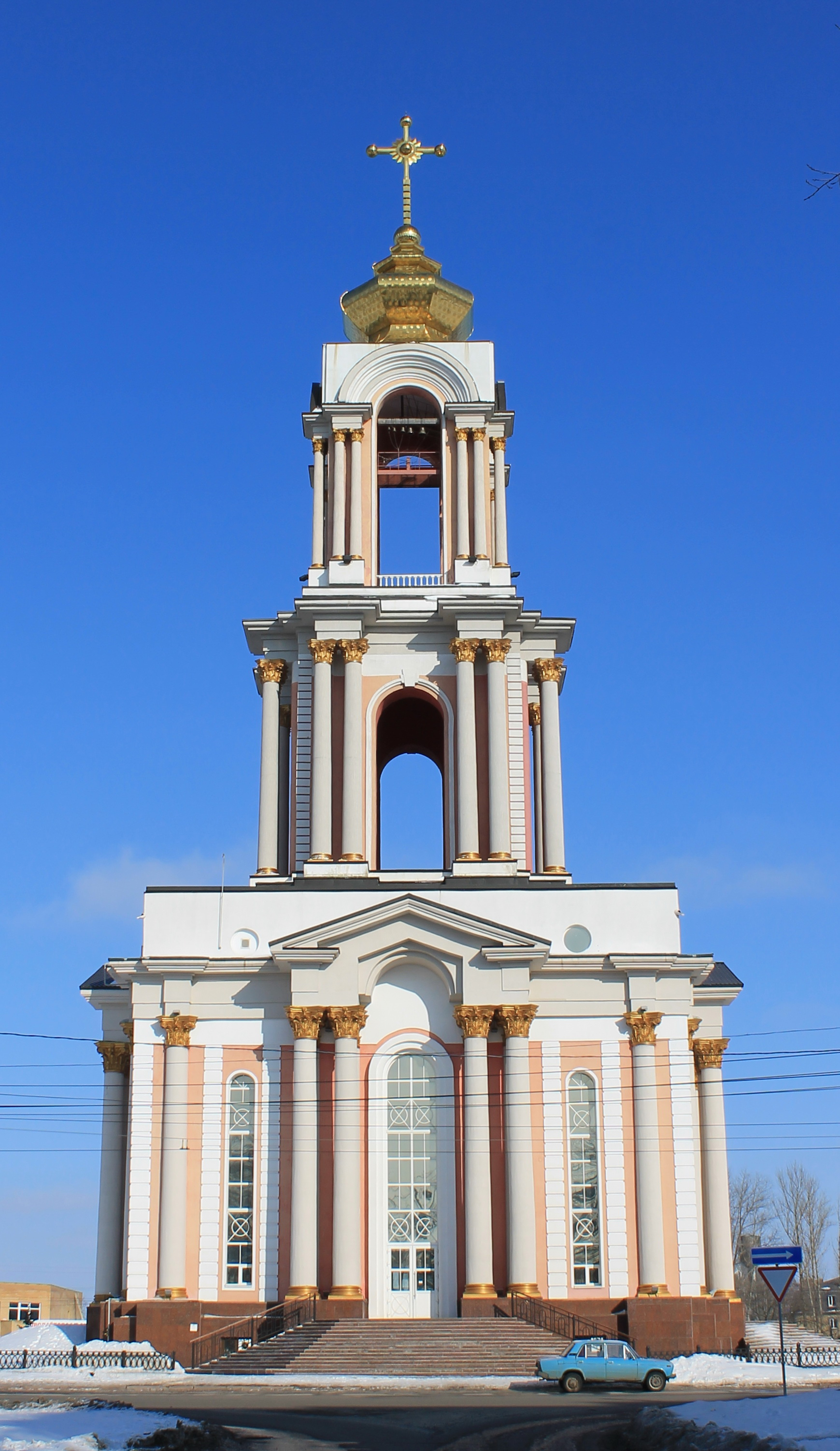 Храм Великомученника Георгия Победоносца в городе Курске, входящий в состав мемориального комплекса «Курская дуга».